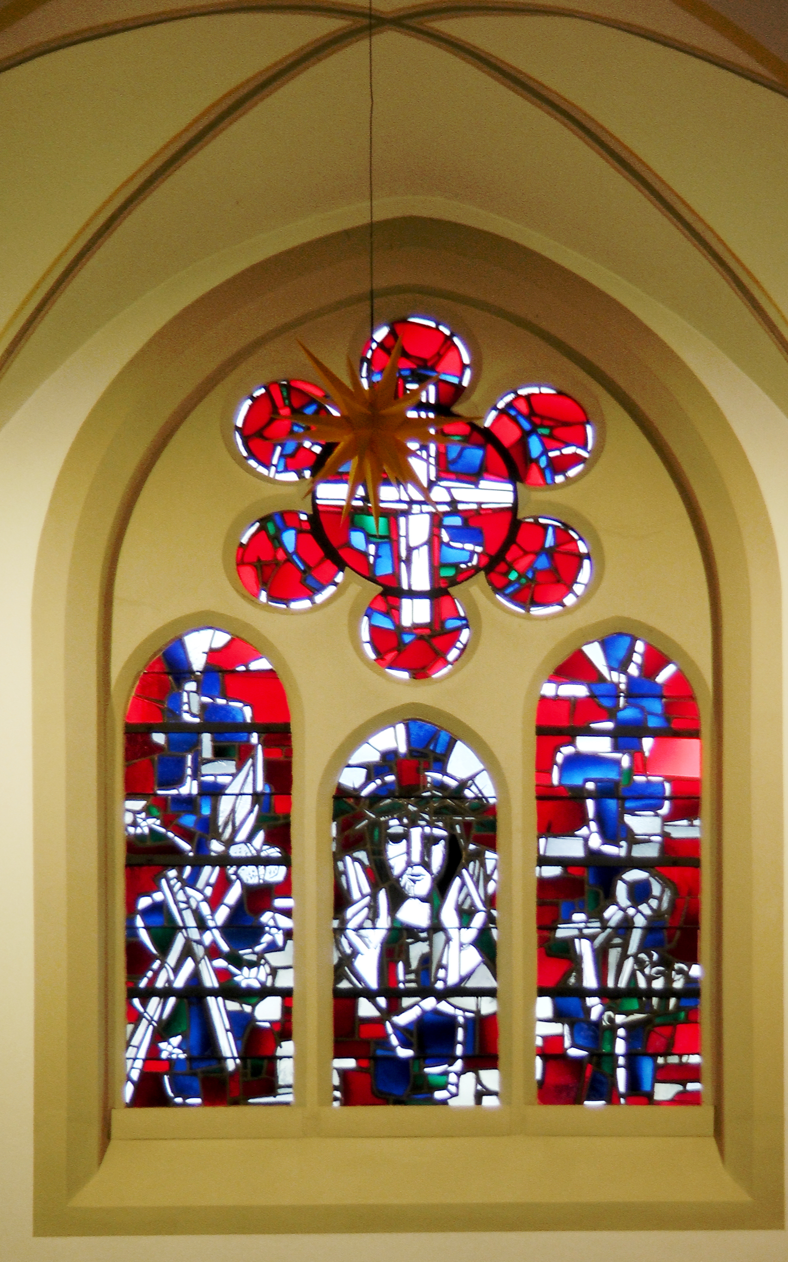 Evangelische Kirche Konz Karthaus - Glasfenster im Chor von Manfred Freitag